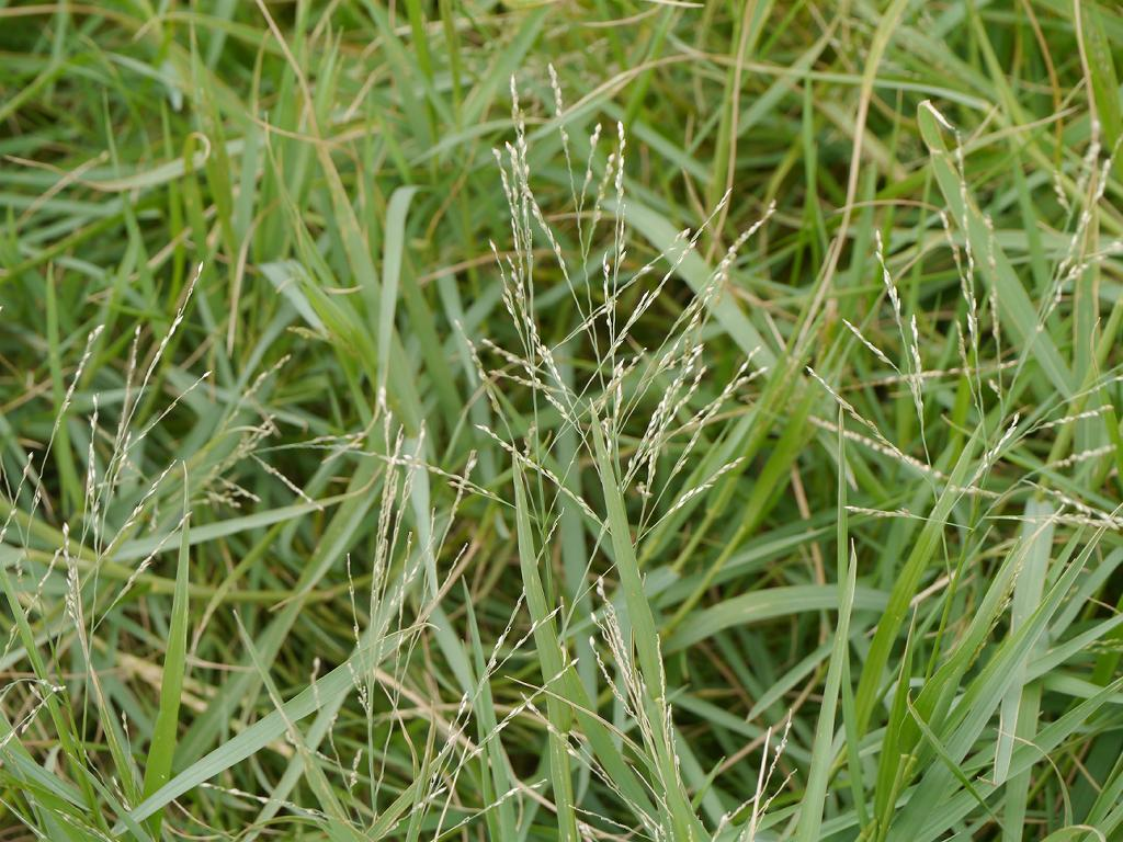 Panicum repens：ハイキビ 2014/10/25 紀伊半島南部：Ｊａｐａｎ